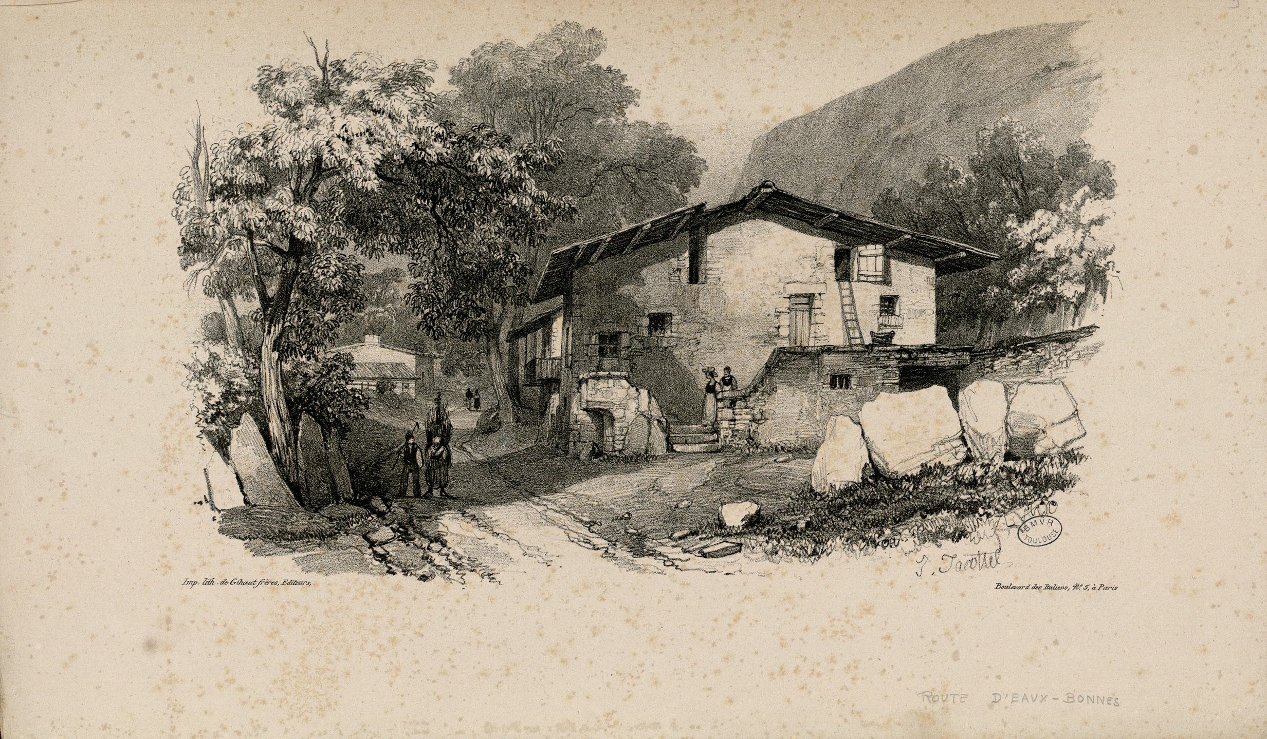 Pl. non légendées dans le texte, mais notes ms. : hypothèse de localisation Ancely, René (1876 - 1966). Possesseur